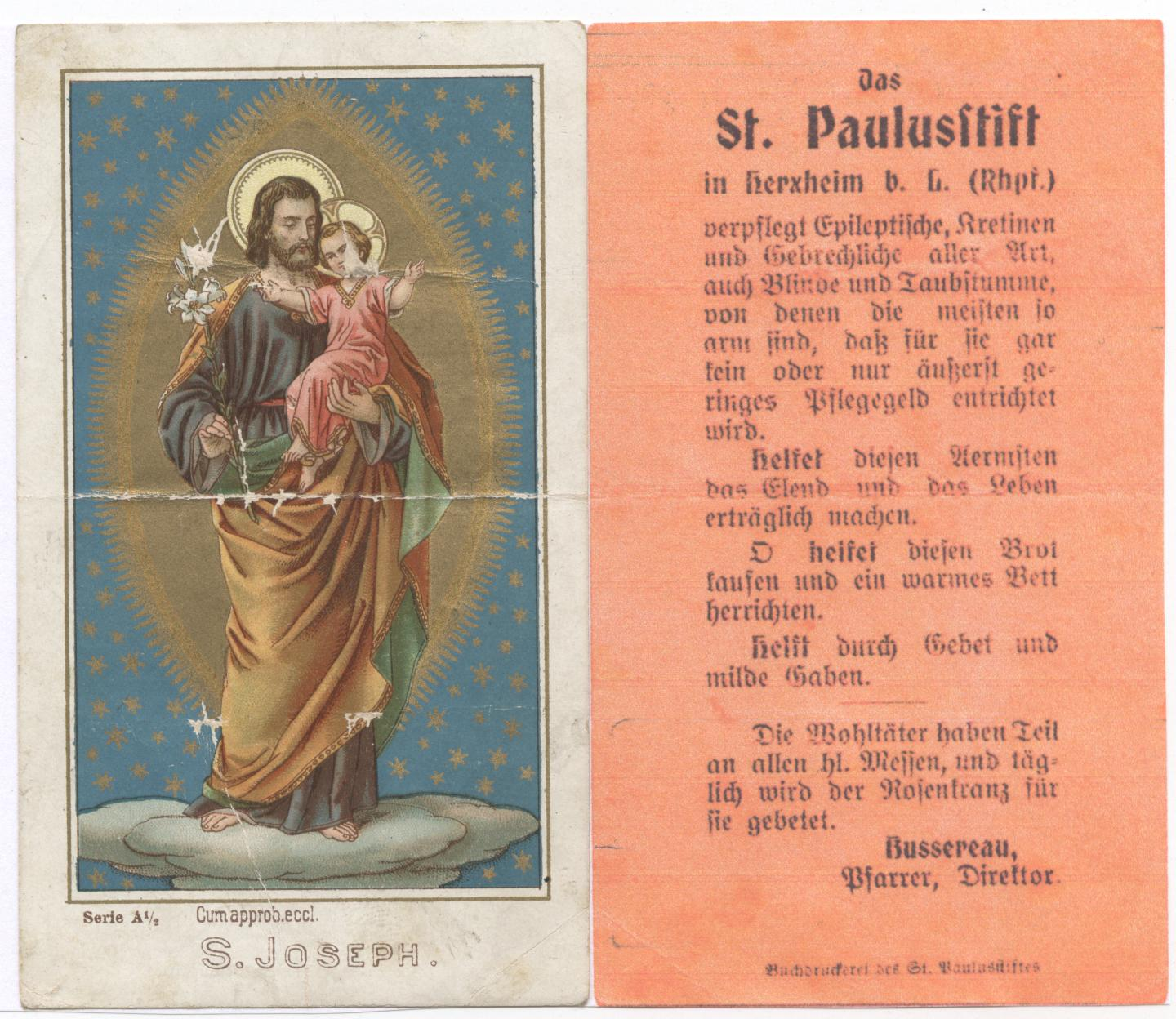 Prälat Jakob Busserau, Andachtsbildchen St. Joseph mit Spendenaufruf